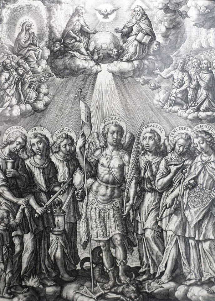 Семь архангелов, гравюра.